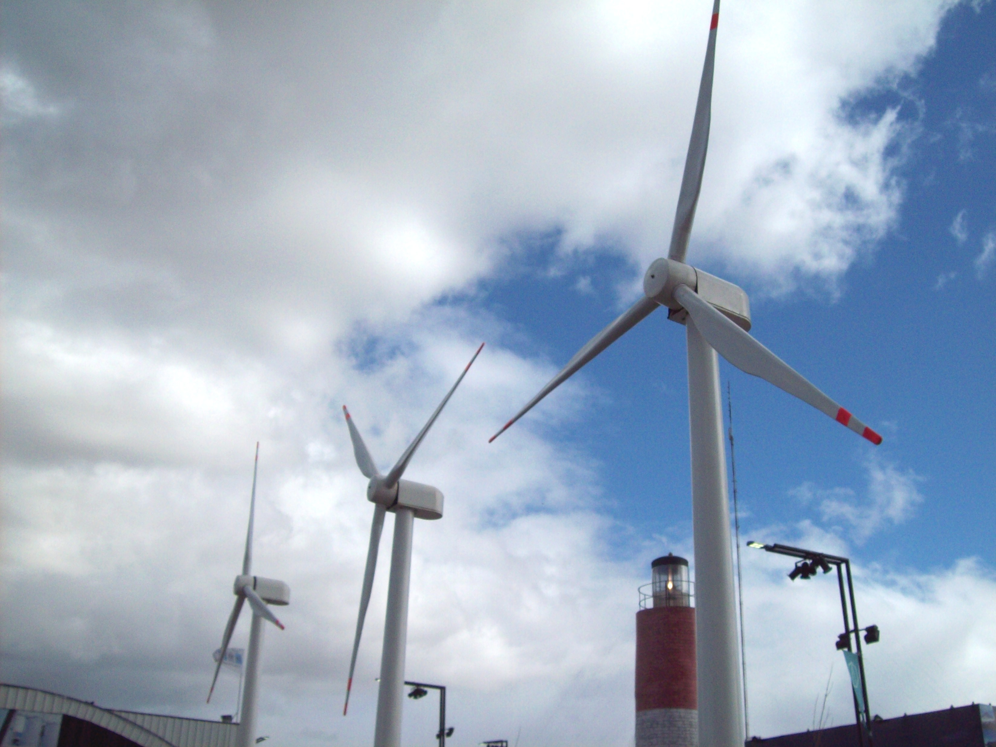 Molinos de viento, energía eólica en Tecnopolis.